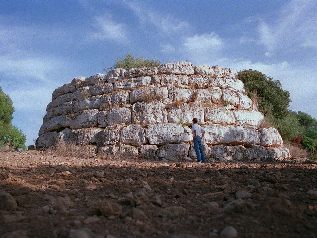 Talayot circular de Mallorca (Talayot de sa Canova, Artà).